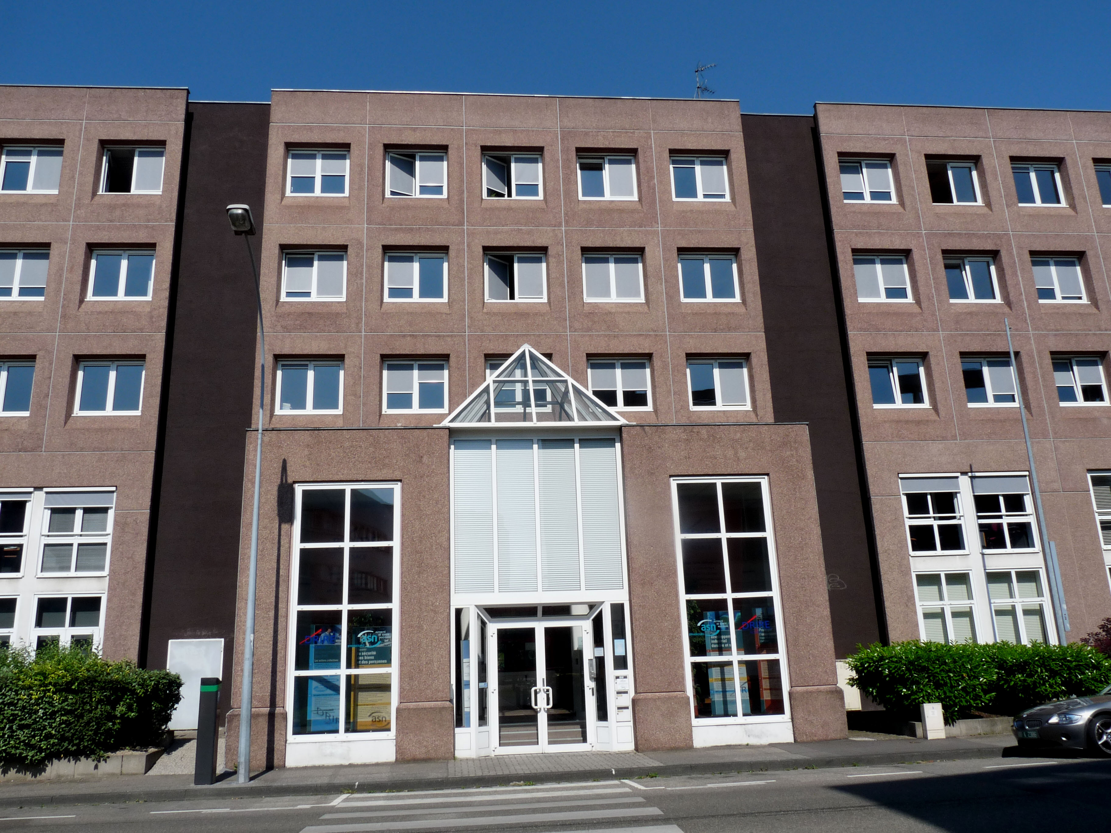 Autorité de sûreté nucléaire (ASN), Division de Strasbourg, 14, rue du bataillon de Marche N°24